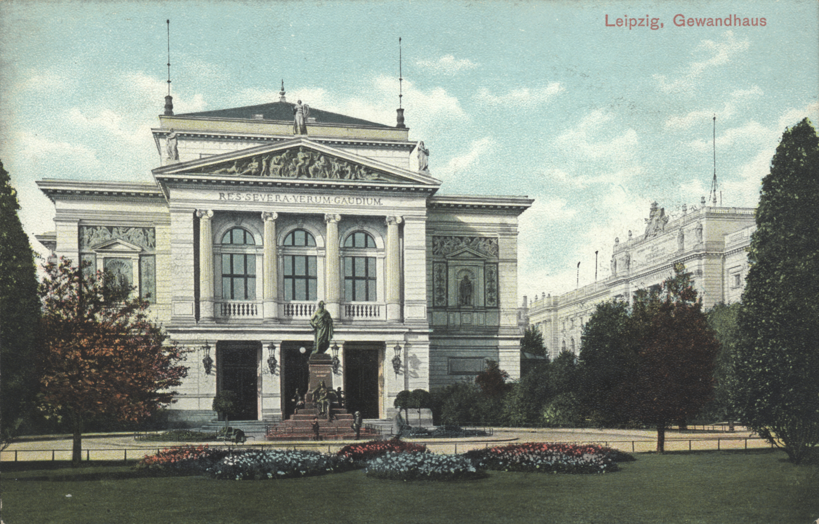 Leipzig, (Altes) Gewandhaus, Postkarte um 1900, Verlag Reinhold Knobbe, Leipzig; No. 408/5